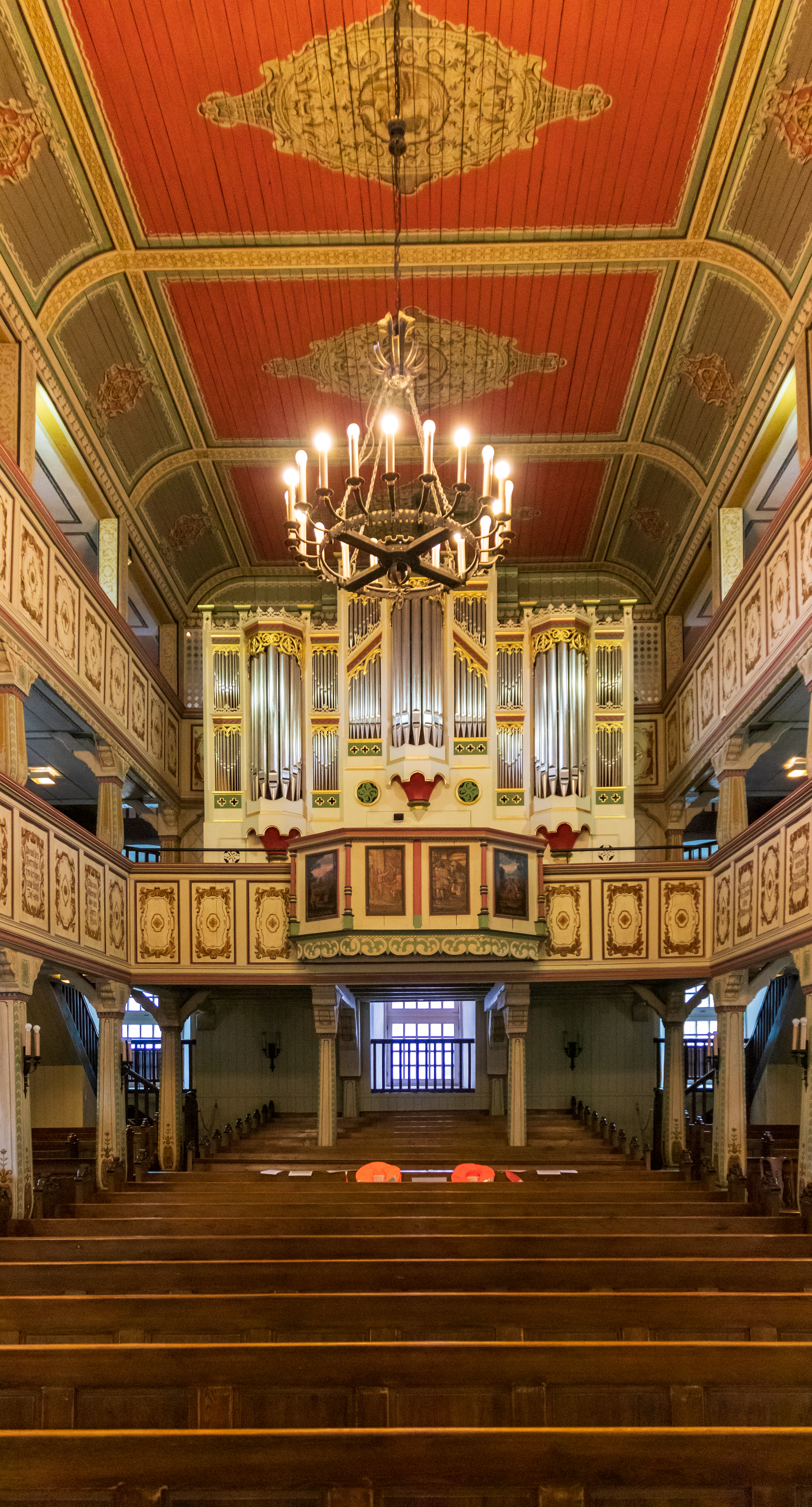 Die evangelisch-lutherische Kirche St. Andreas, eine nach dem Schutzpatron der Bergleute benannte Saalkirche, steht in der Fluchtlinie der Hauptstraße im historischen Stadtkern von Bad Lauterberg. Blick in den Innenraum